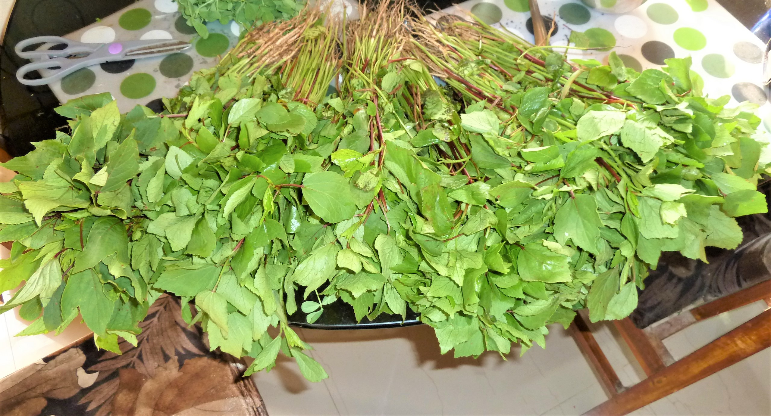 గోంగూర కట్టలు